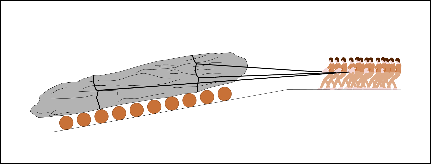 Utilizacion de bilhons per desplaçar una carga pesuca durant la construccion d'un megalit.